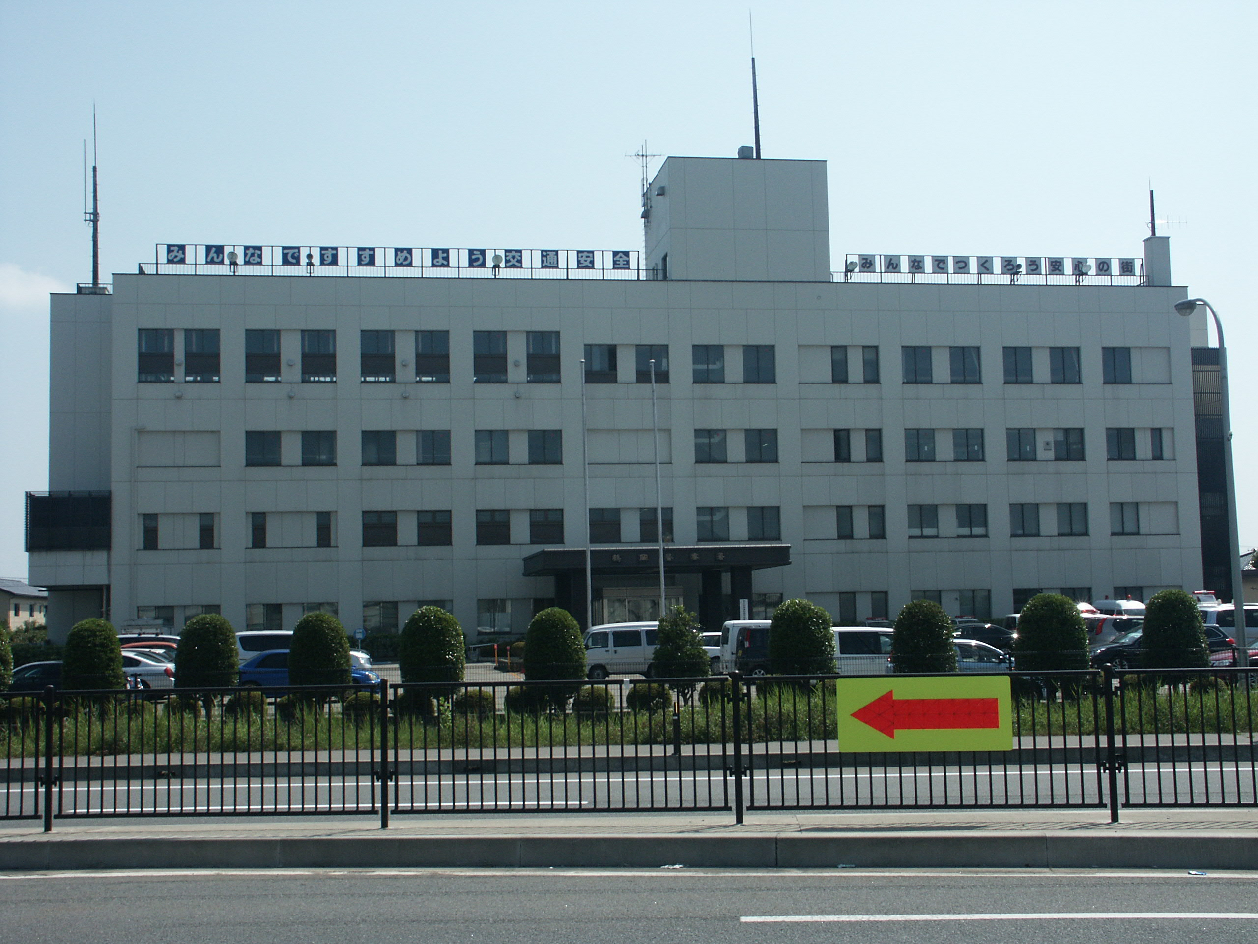 鶴岡警察署庁舎